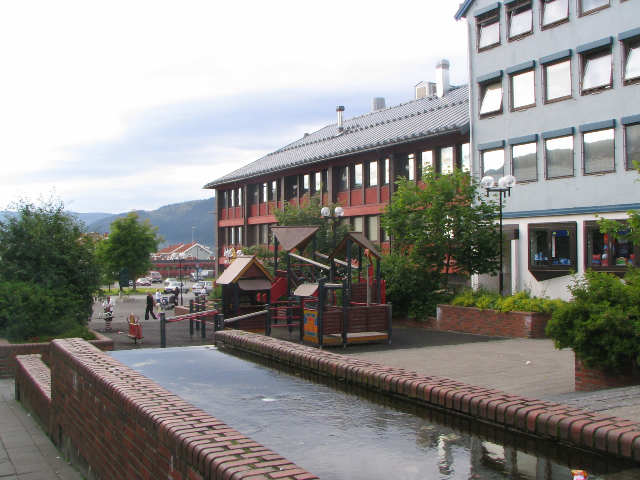 Mo i Rana, Nordland, sentrum av byen